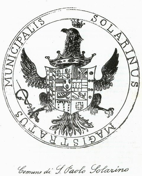 Comune di Solarino old coat of arms